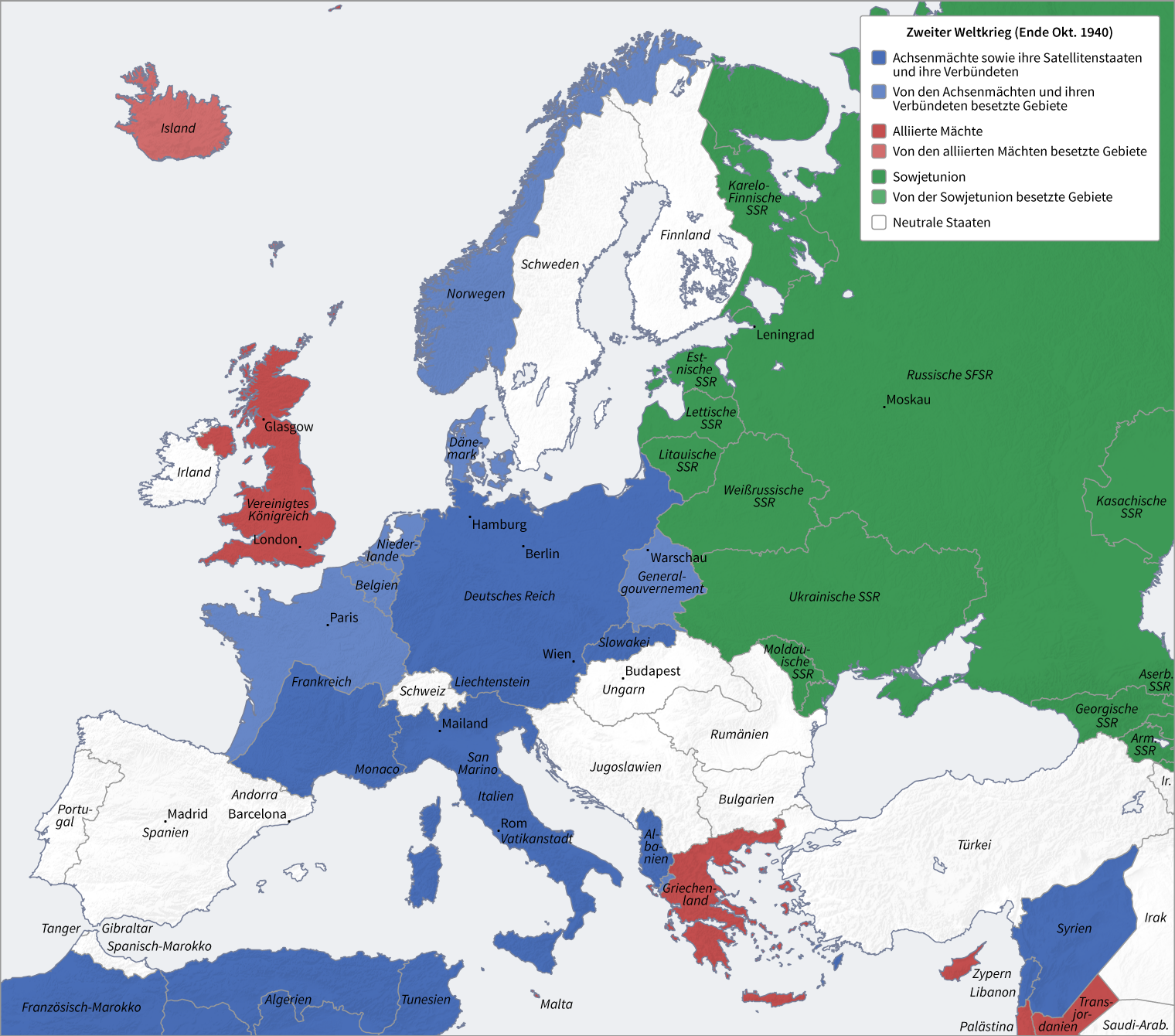 Zweiter Weltkrieg (Ende Okt. 1940)